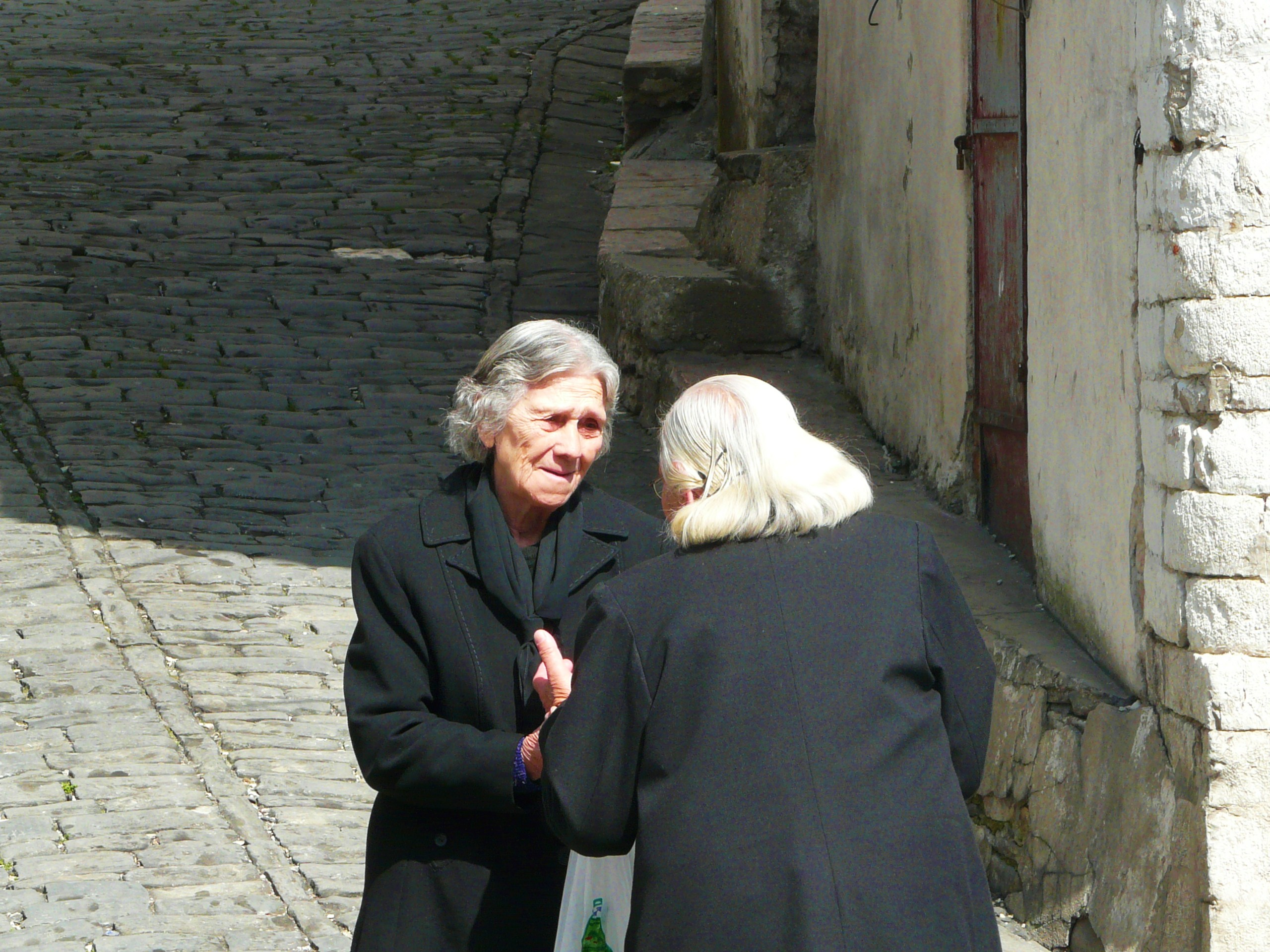 Gjirokastër